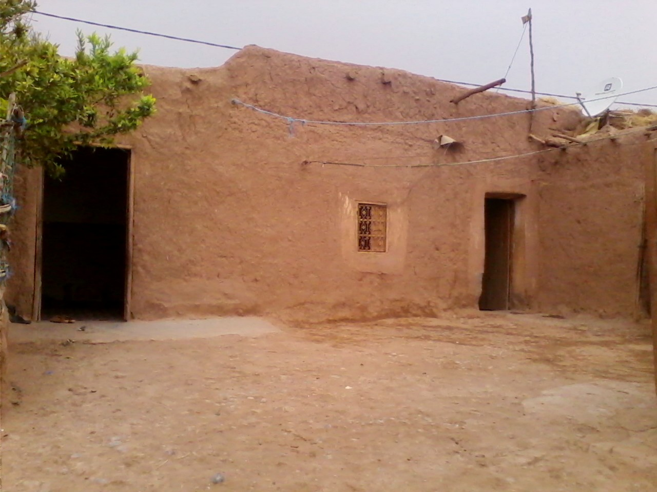 منزل ترابي بالبادية المغربية